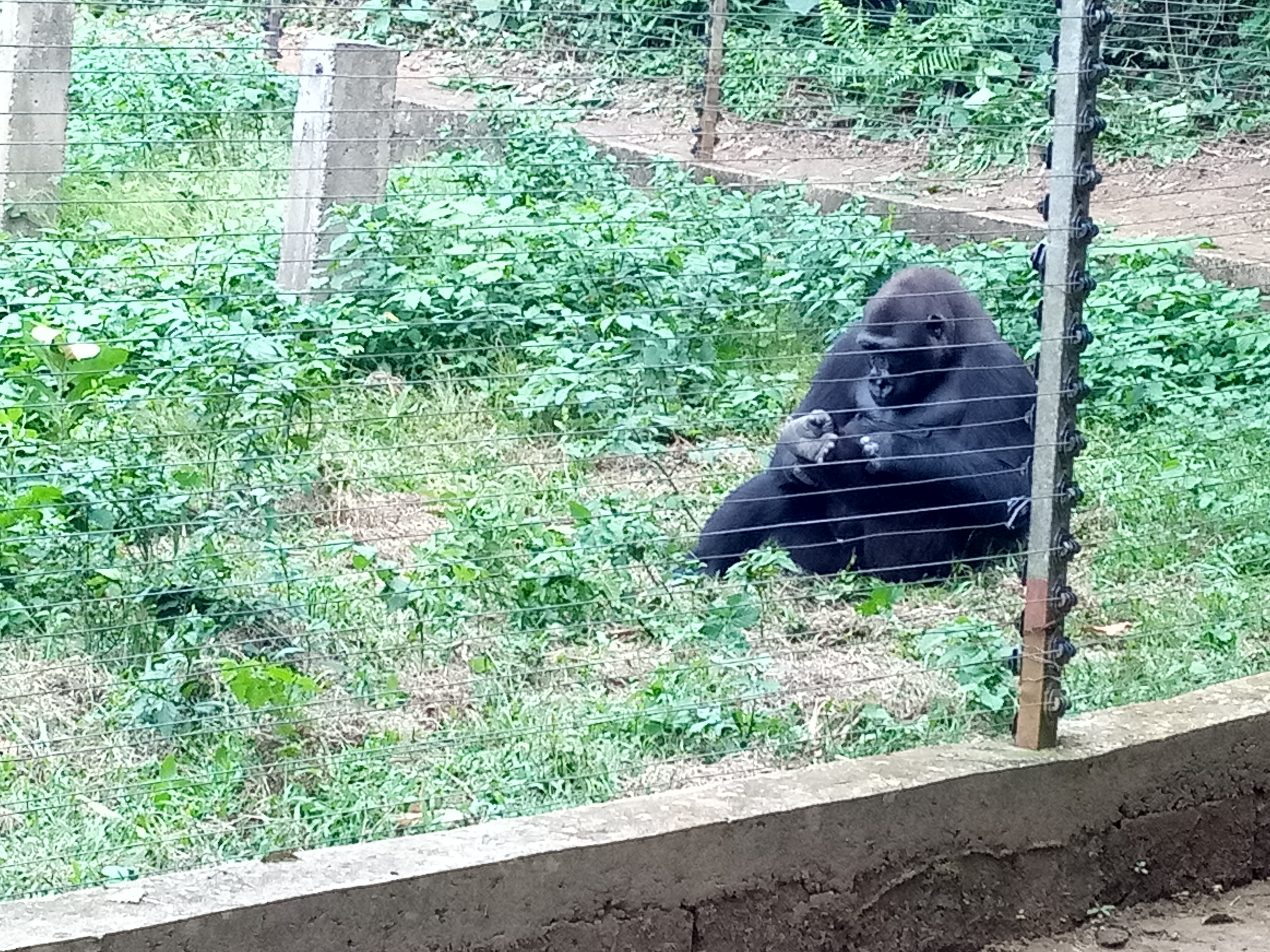 Primate Reserve sanctuary Mefou, located 5km from Mbalmayo, near Yaoundé